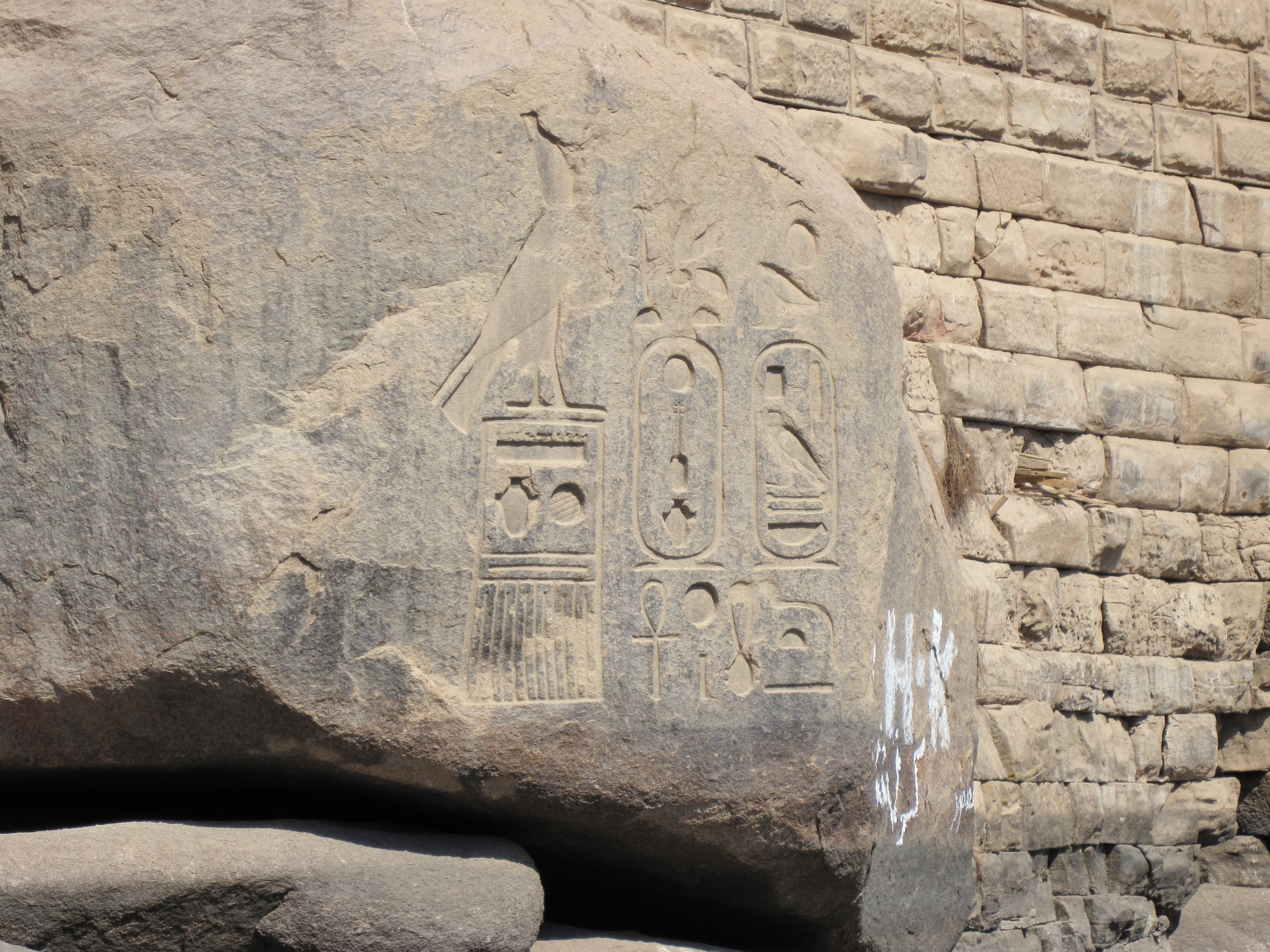 Königskartuschen von Psammetich II. an einem Felsen an der Südostseite der Insel Elephantine in Assuan, Ägypten